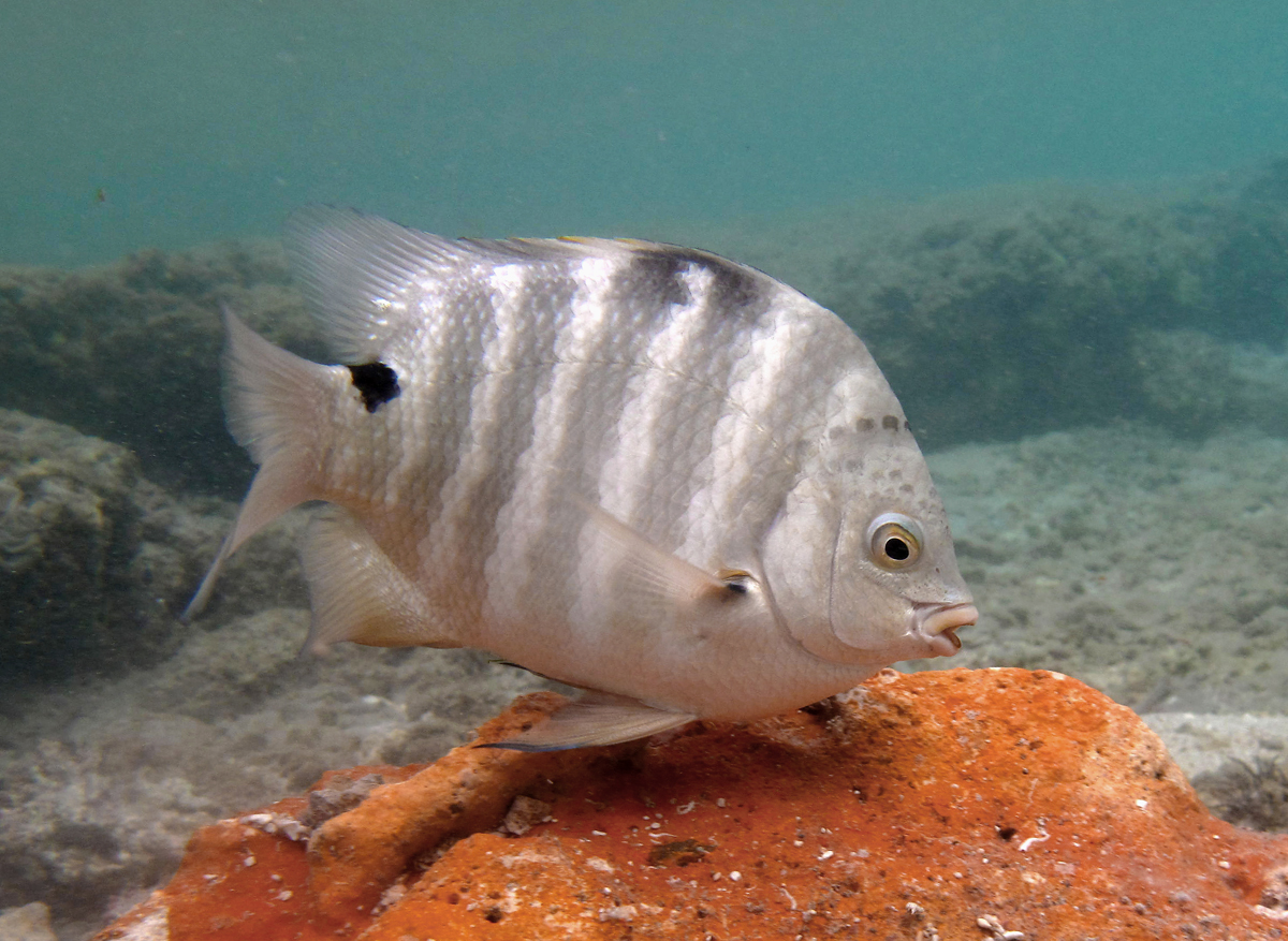 Un sergent-major à tache noire (Abudefduf sordidus) à la Réunion.